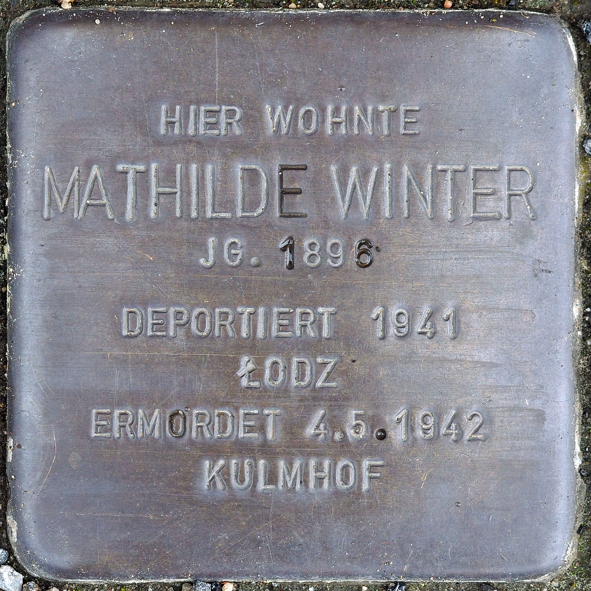 Stolpersteine Korschenbroich: Winter, Mathilde (1896)